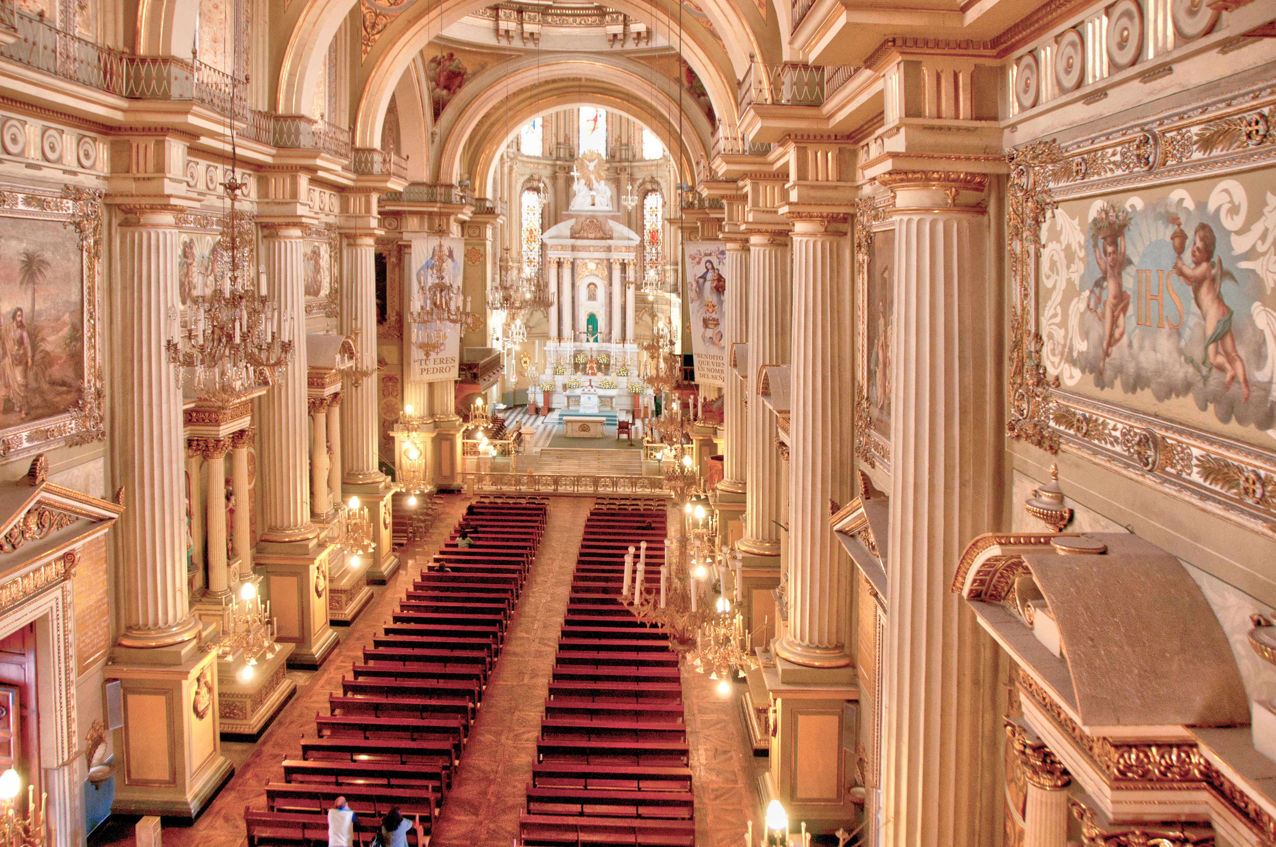 Interior de la Catedral Nuestra Señora de la Luz de León, Guanajuato, México